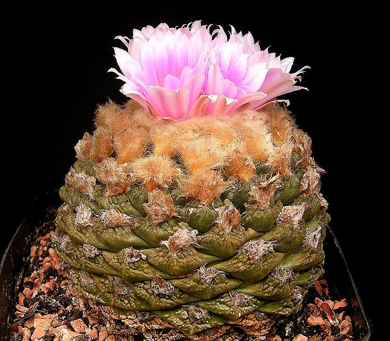 Ariocarpus fissuratus